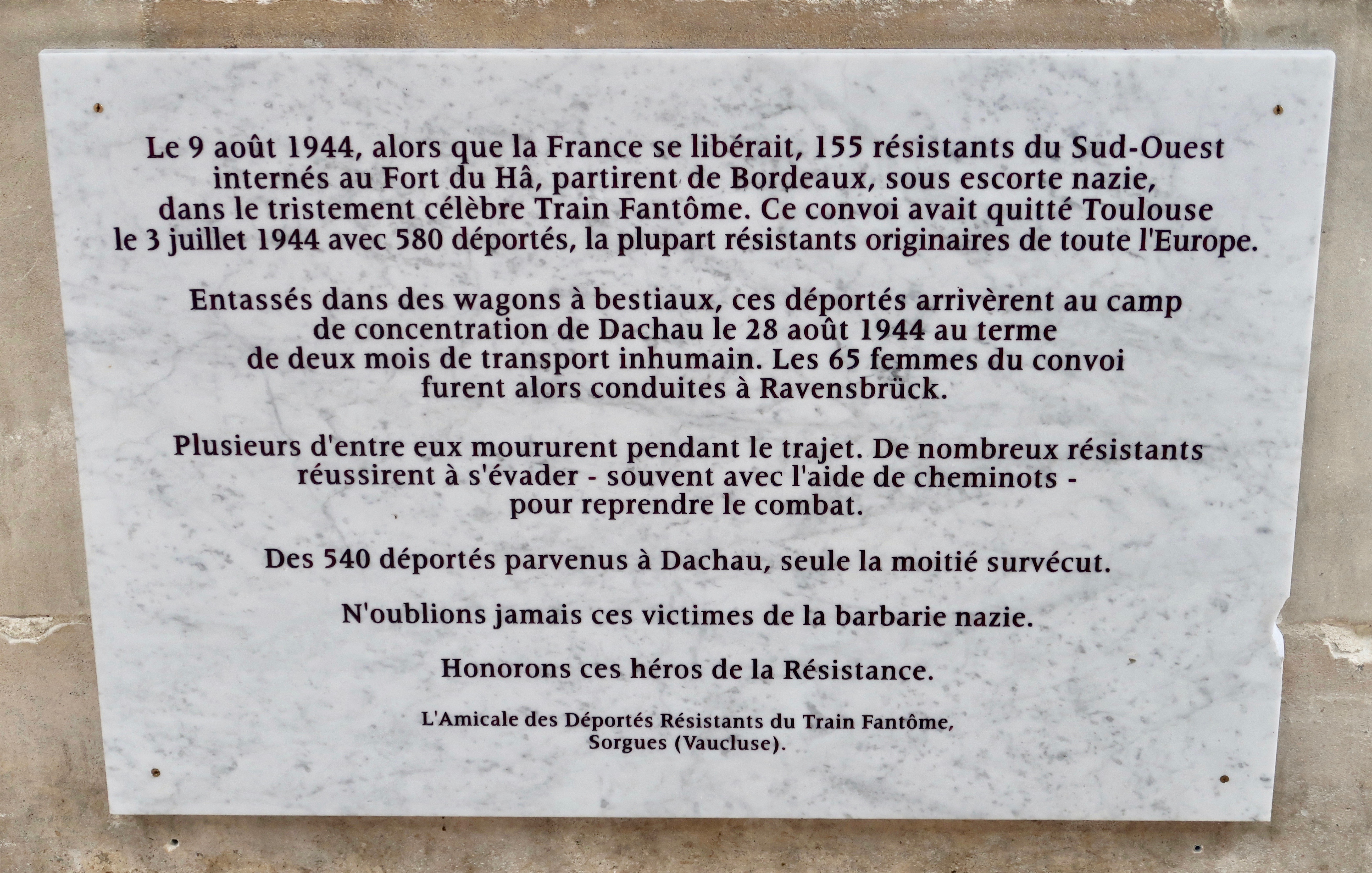 Plaque en hommage aux victimes du "Train fantôme" de la Seconde Guerre mondiale. En gare de Bordeaux-Saint-Jean (Gironde), dans la partie nord-ouest du hall 1.